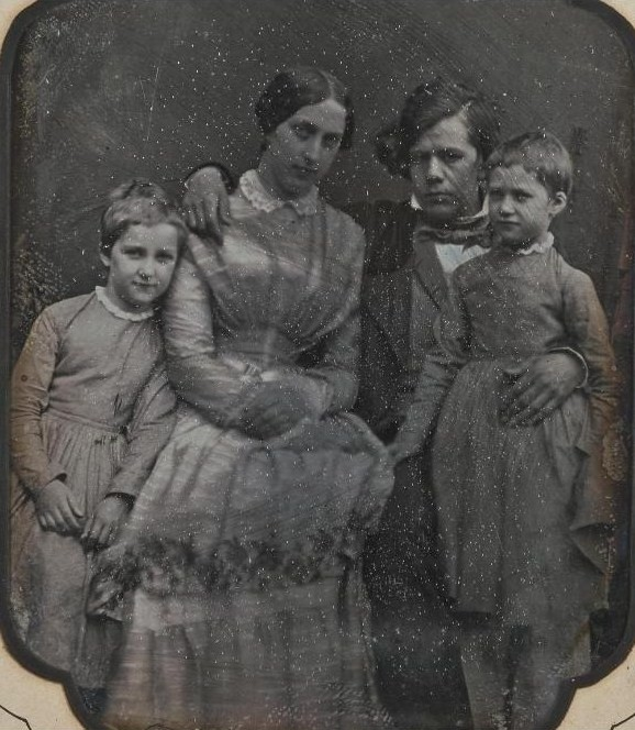 Князь Павел Петрович Вяземский с женой Марией Аркадьевной и её дочерьми от первого брака — Марией и Верой.